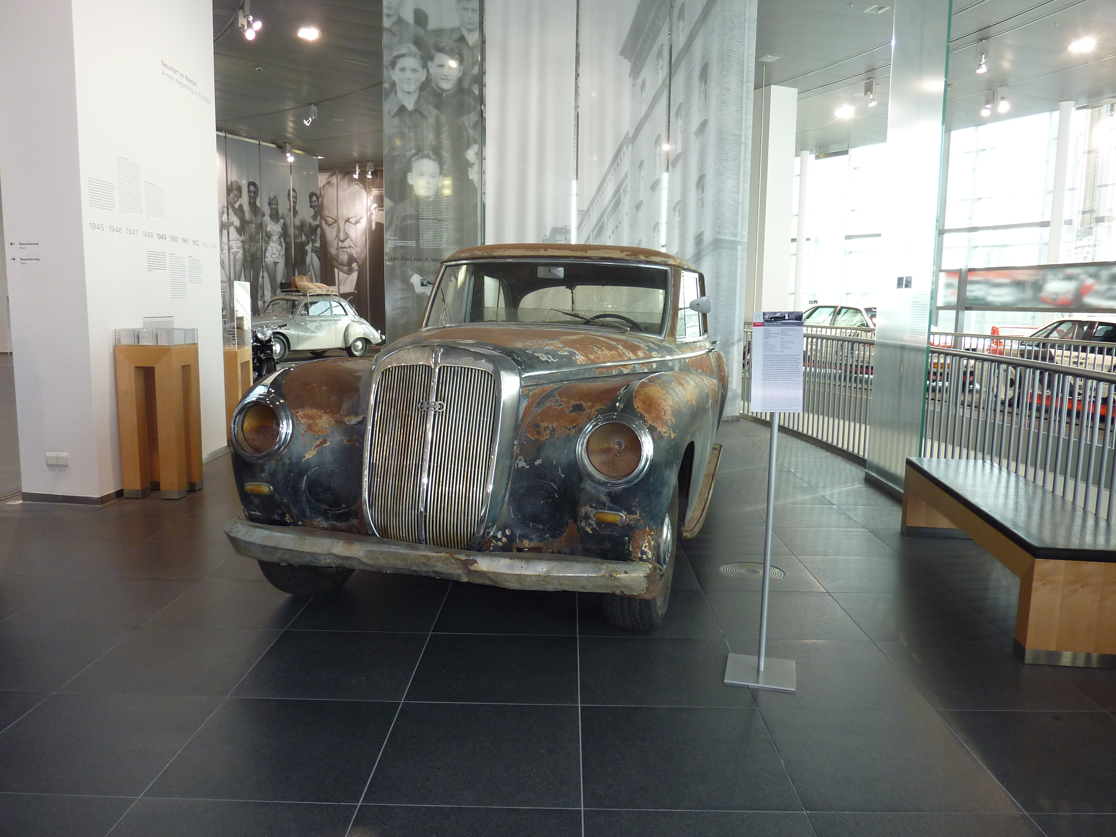 Horch 830 BL von 1953, Geschenk für Richard Bruhn